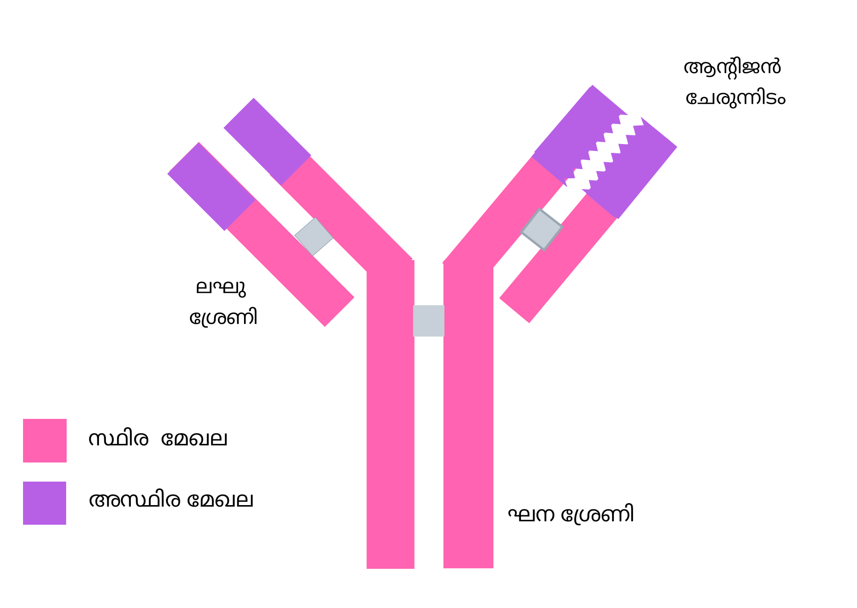 ആന്റിബോഡി തന്മാത്രയുടെ ഭാഗങ്ങൾ